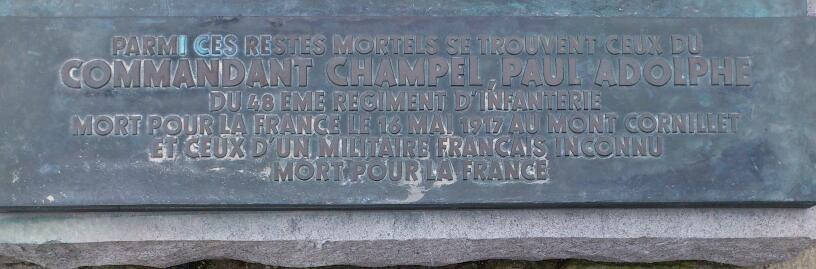 Photographie prise à Warmeriville dans le cimetière allemand où les corps des victimes du tunnel du Mont Cornillet (conflit 1914-1918) ont été transférés en 1974. Paul Adolphe Champel saint-germinais prisonnier des allemands fait partie de ces victimes